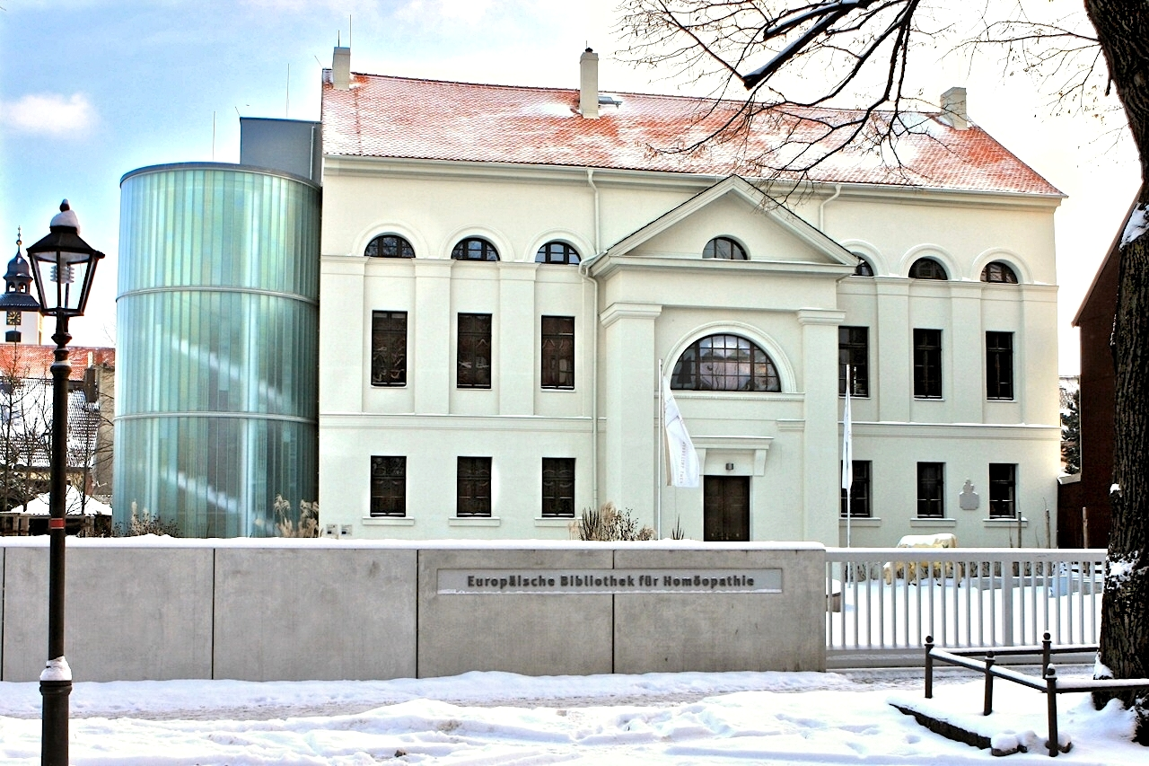 Das Haus der Europäischen Bibliothek für Homöopathie in Köthen (Anhalt), Wallstraße 48.